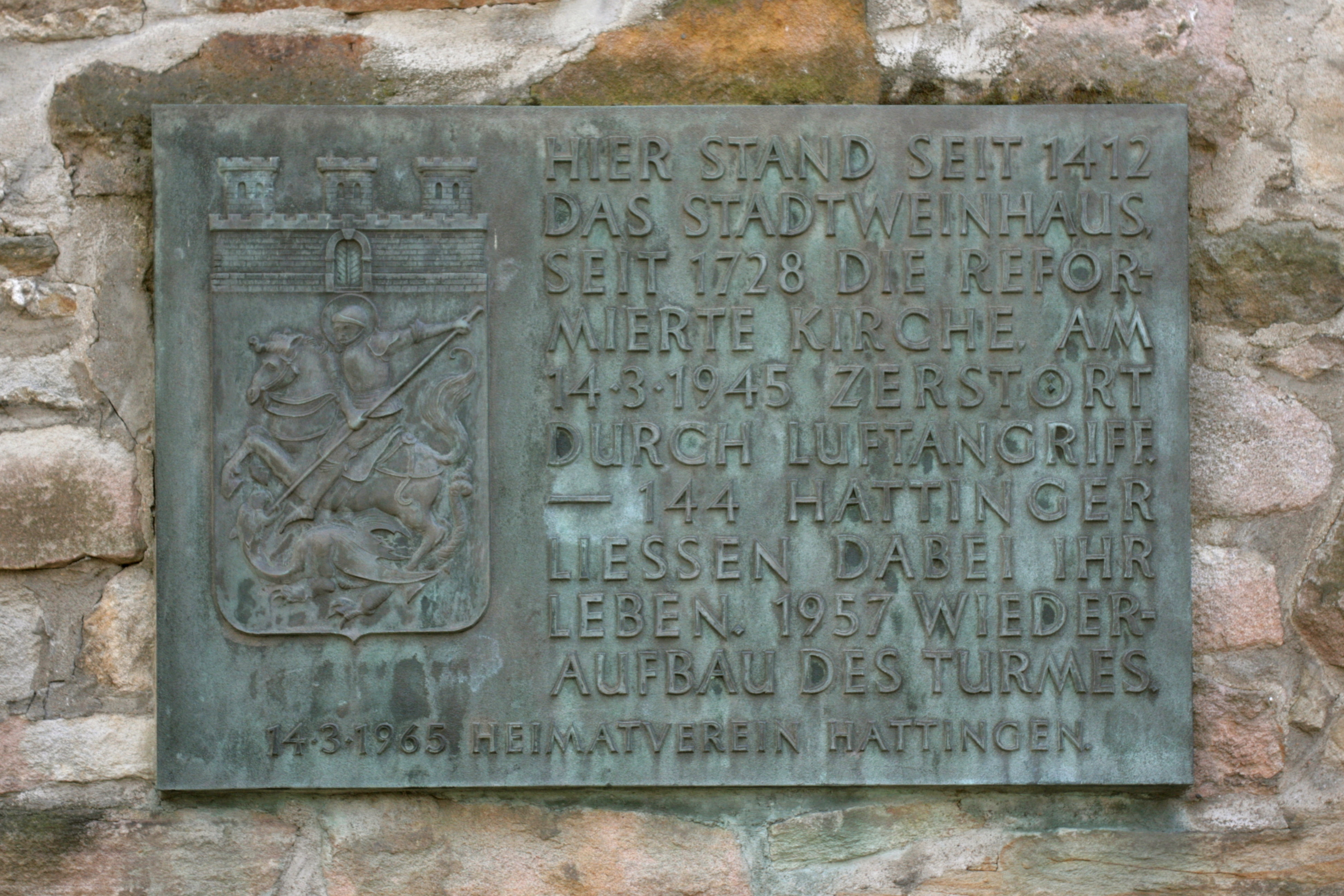 Ehemalige Reformierte Johanniskirche am Untermarkt in Hattingen